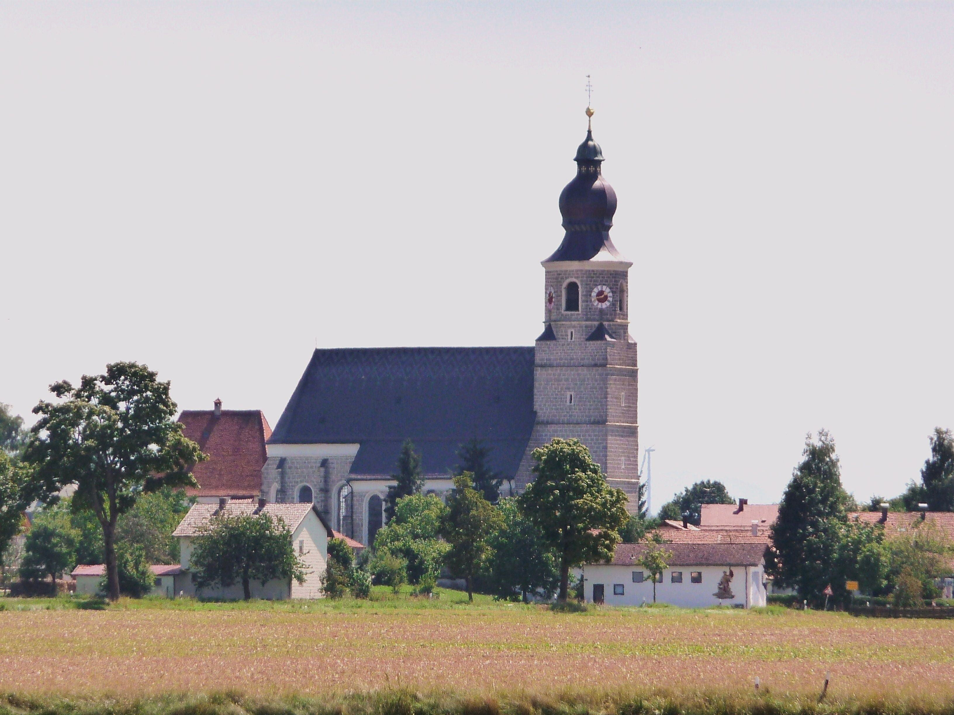 Die Pfarrkirche Maria Himmelfahrt in Feichten an der Alz